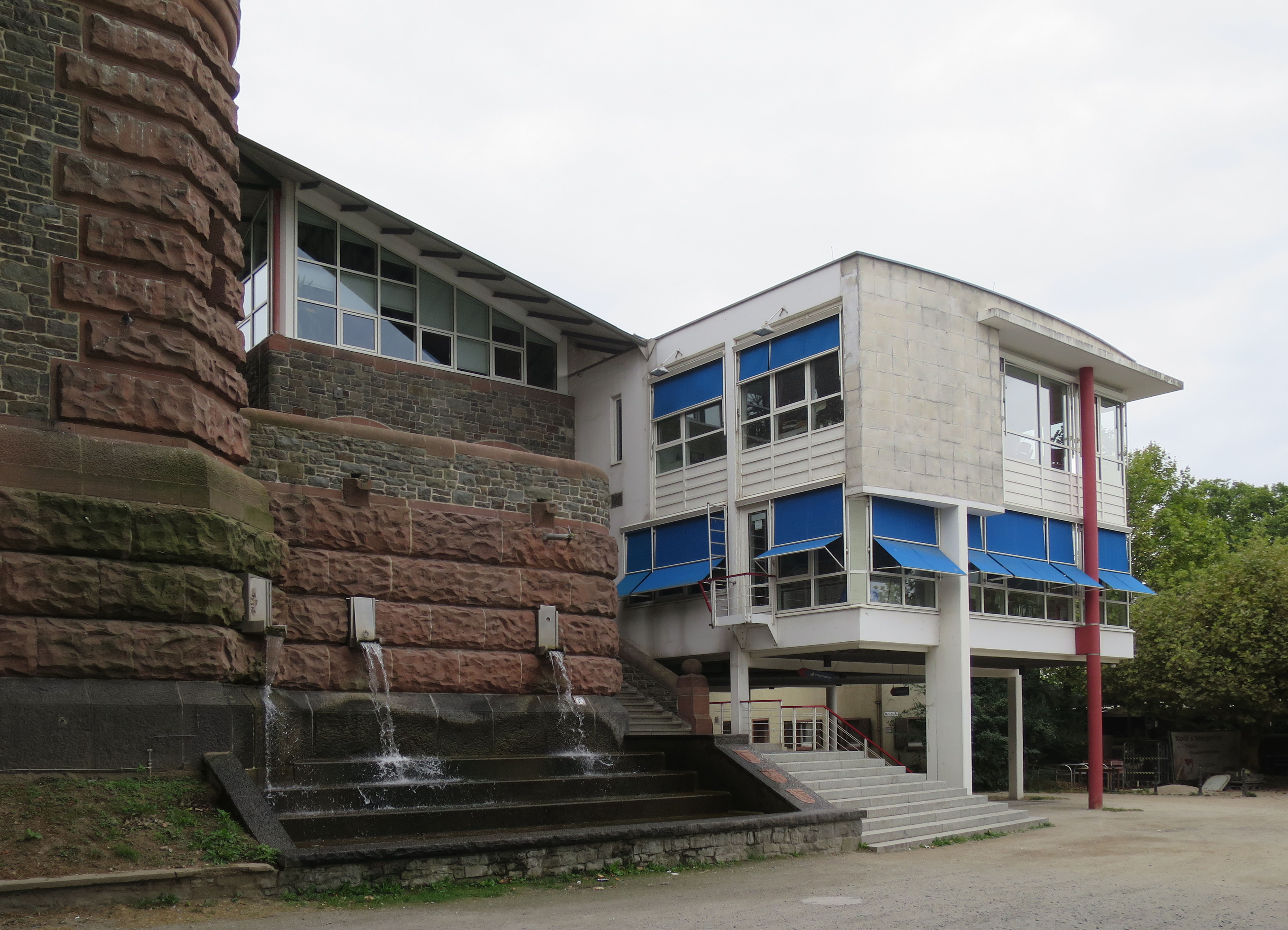 Rheingütestation Worms